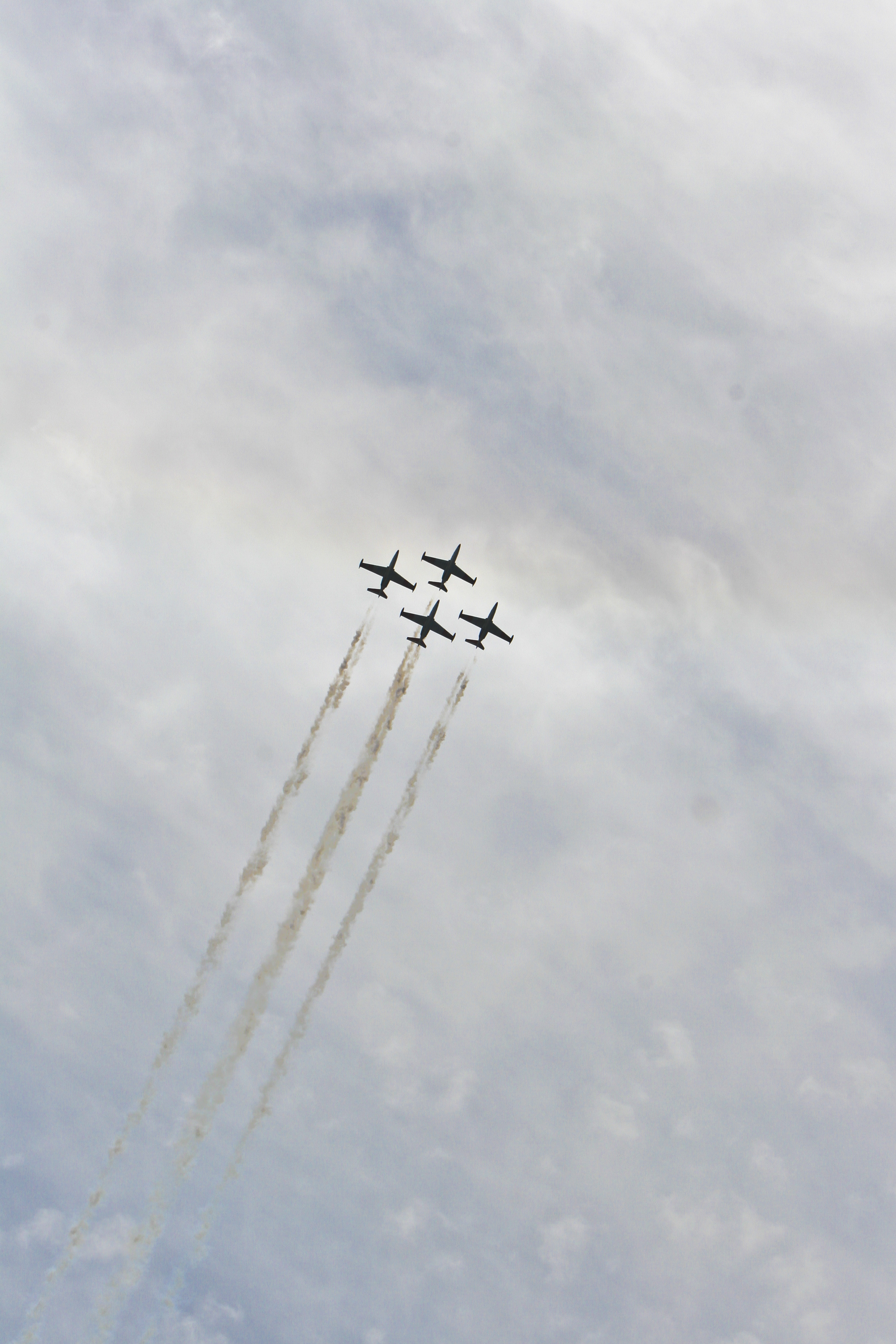 מפגן חיל האוויר יום העצמאות ה-60 למדינת ישראל